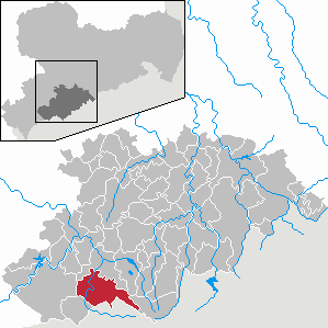 Breitenbrunn/Erzgeb. im Erzgebirgskreis, Sachsen